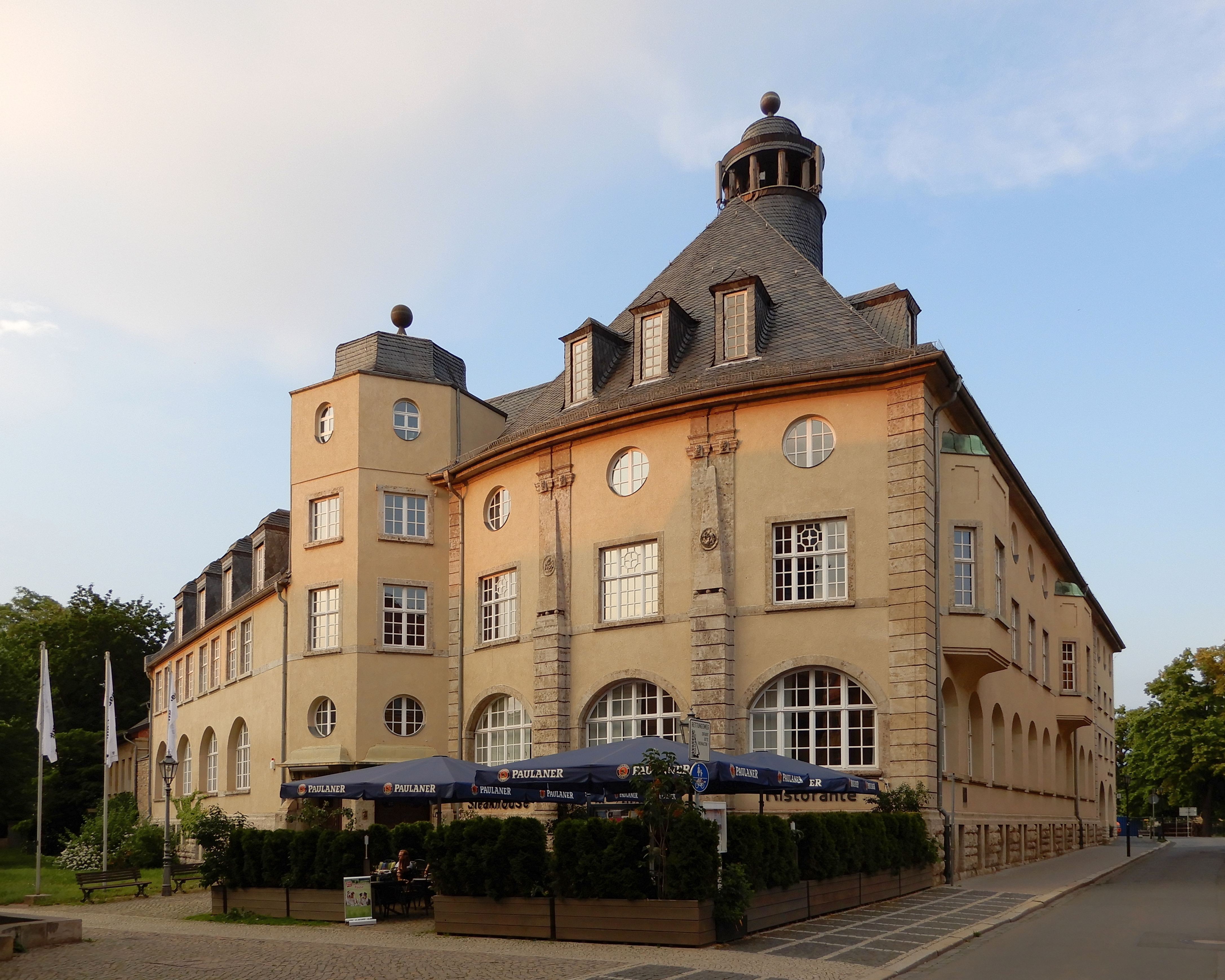 Gebäude Hecknerstraße 6 in Aschersleben